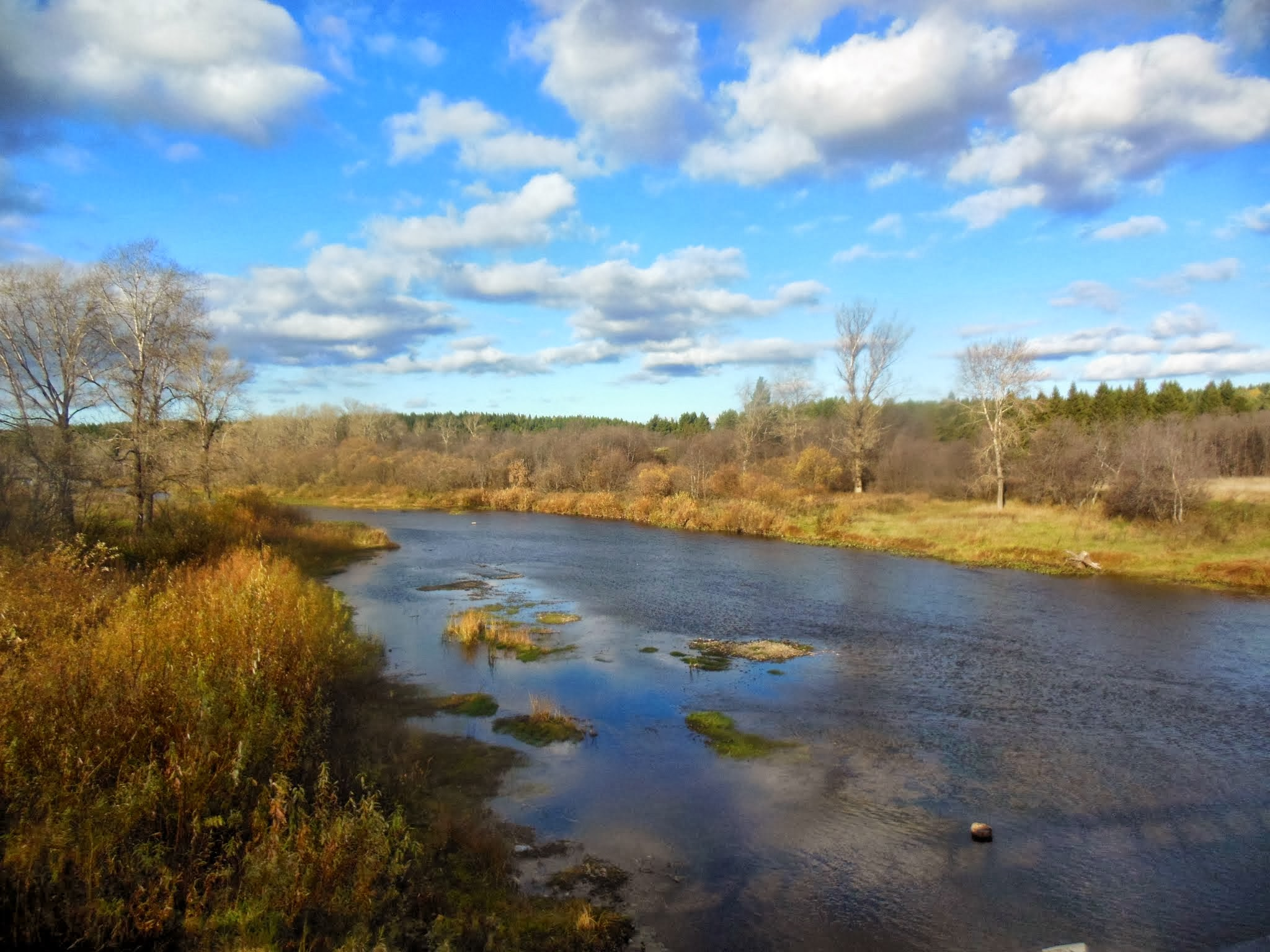 Permskiy r-n, Permskiy kray, Russia